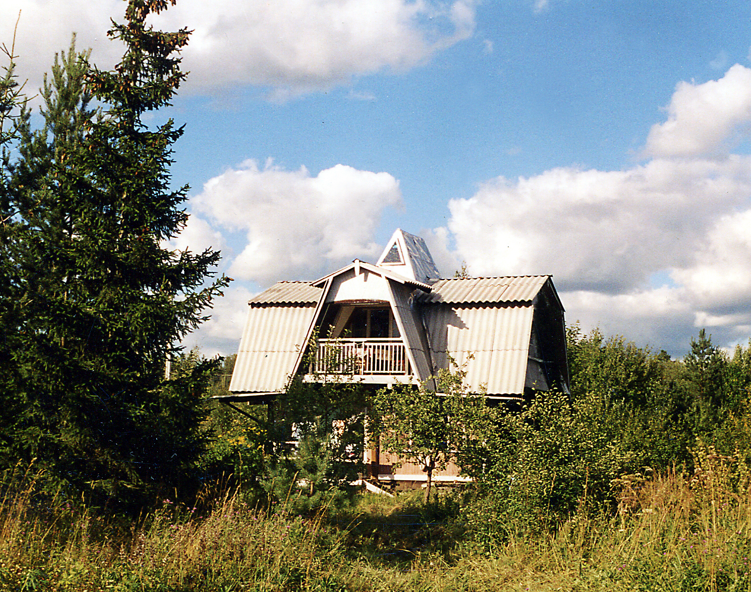 "Datscha"-a private sommer holiday bungalow bei Trubnikovo